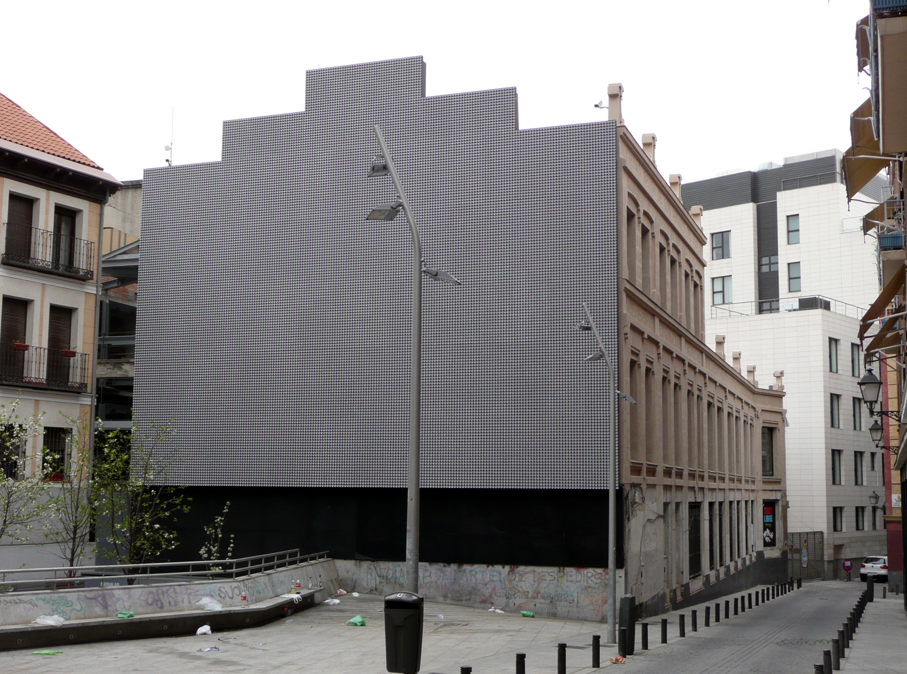 Madrid